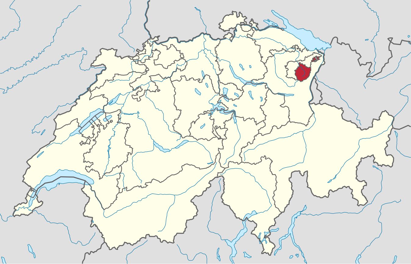 Lage vom Kanton Appenzell Innerrhoden in der Schweiz